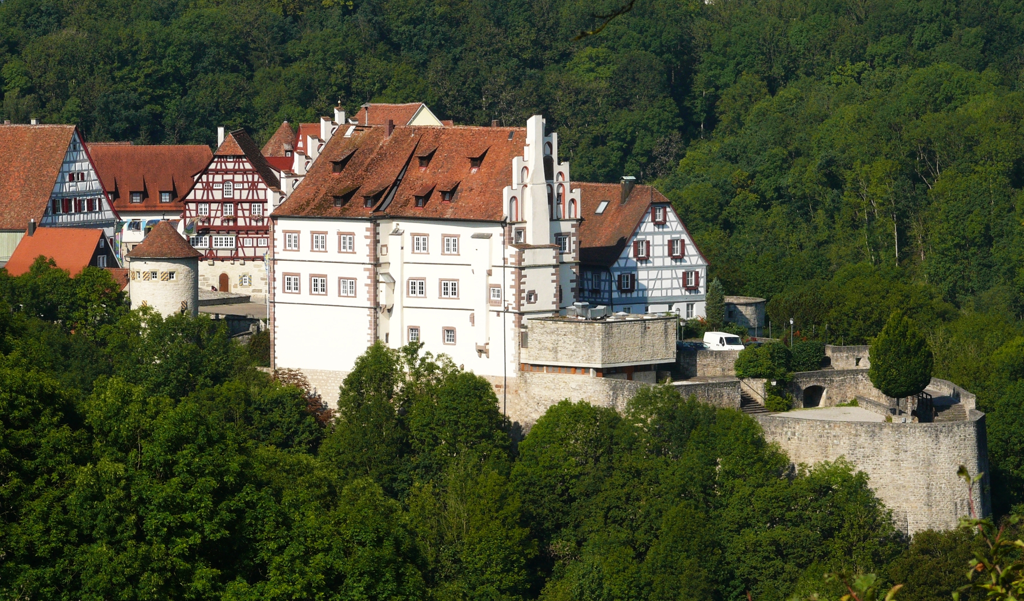 Schloß Vellberg, Germany